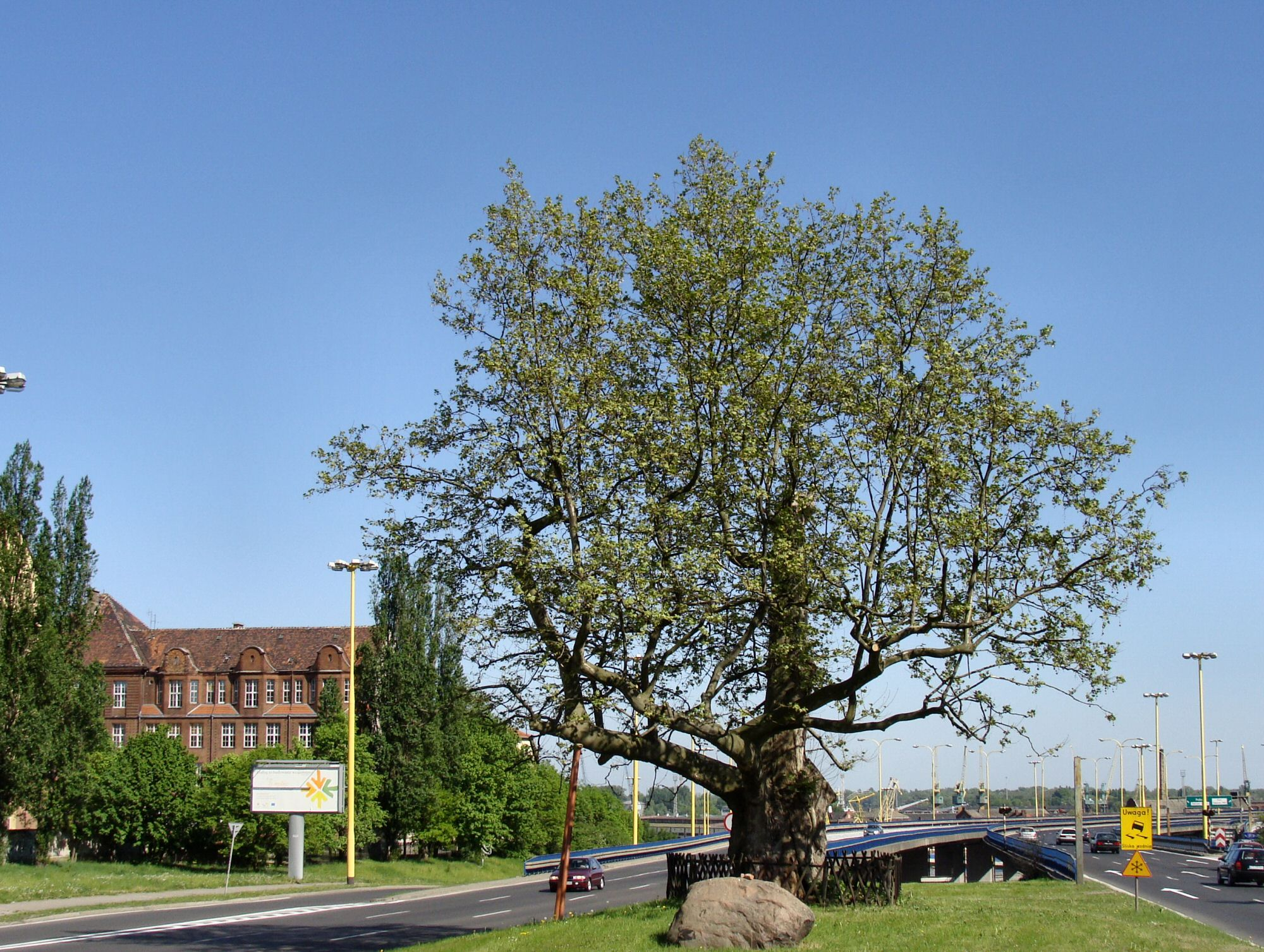 Platan klonolistny przy Trasie Zamkowej w Szczecinie - pomnik przyrody